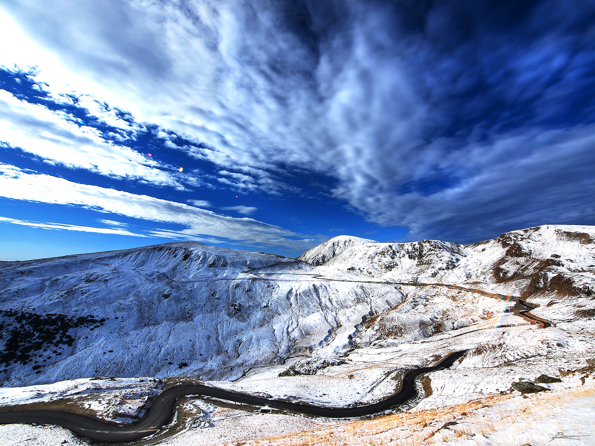 Transalpina road, Romania